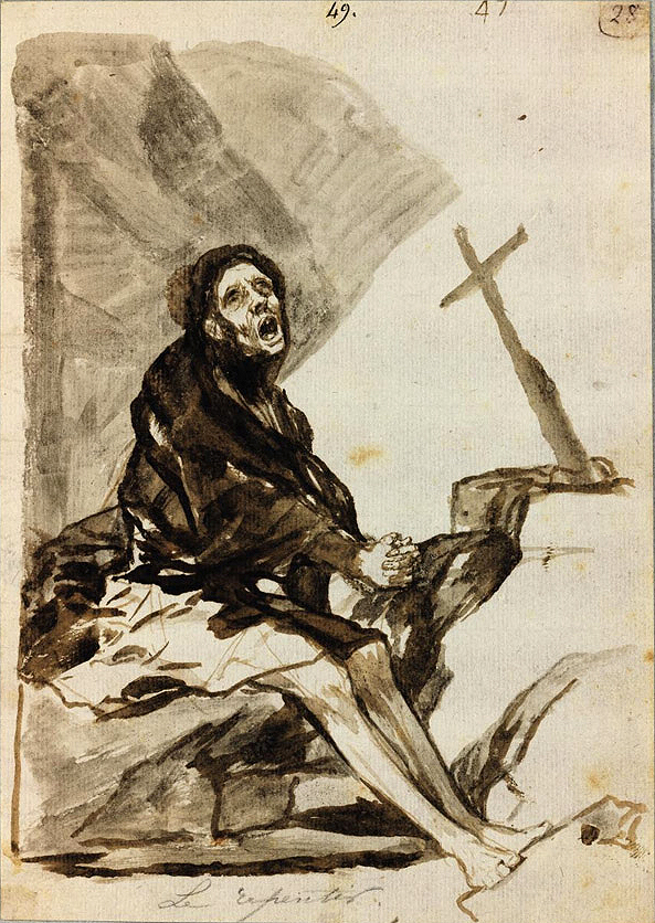 «Arrepentimiento». Dibujo a la aguada marrón y gris, lápiz y tinta marrón. 21 x 15,2 cm. Álbum F, o Álbum Imágenes de España.